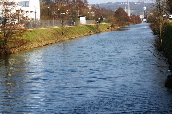 Schleis N° 2: De Schleisekanal flossopwärts.